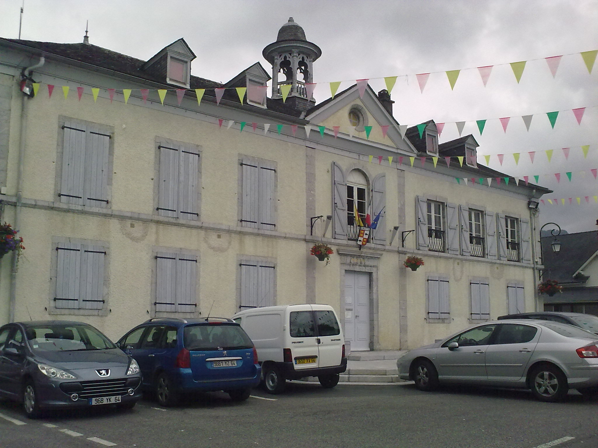 Arette le 4 juillet 2010.